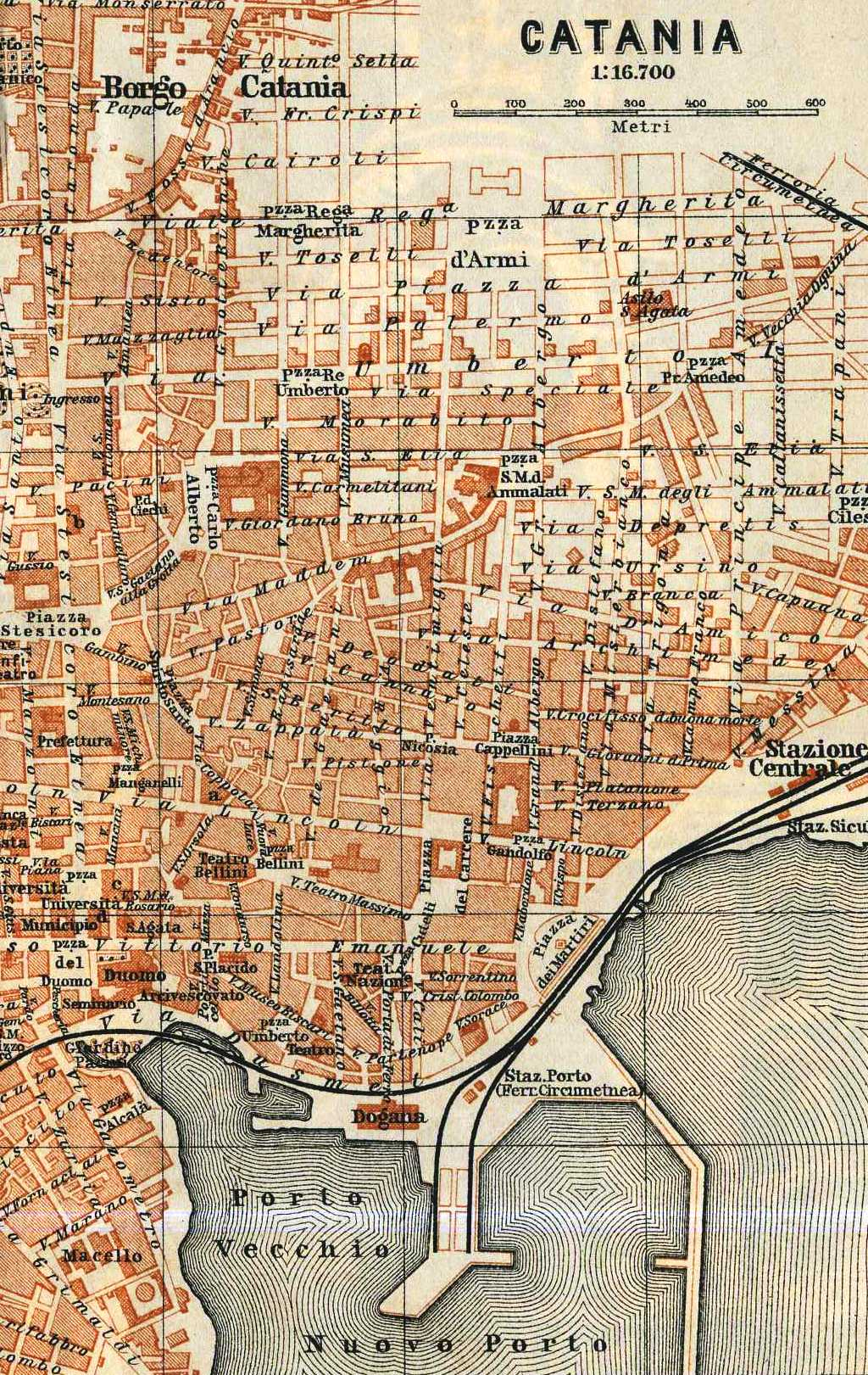 Catania carta1243e3 Baedeker 13.Aufl. 1905